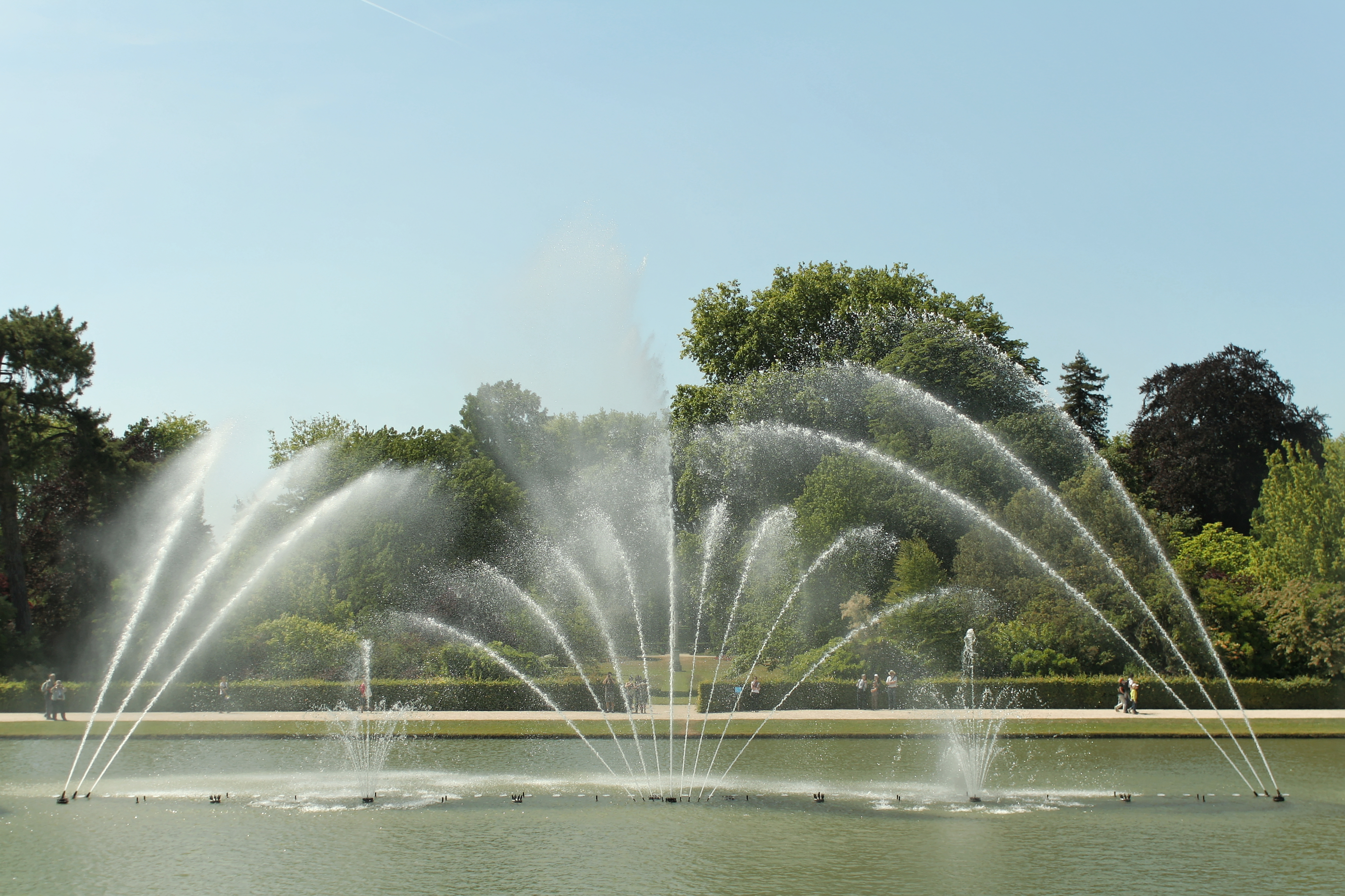 Parc de Versailles, Bassin du Miroir, jets d'eau.